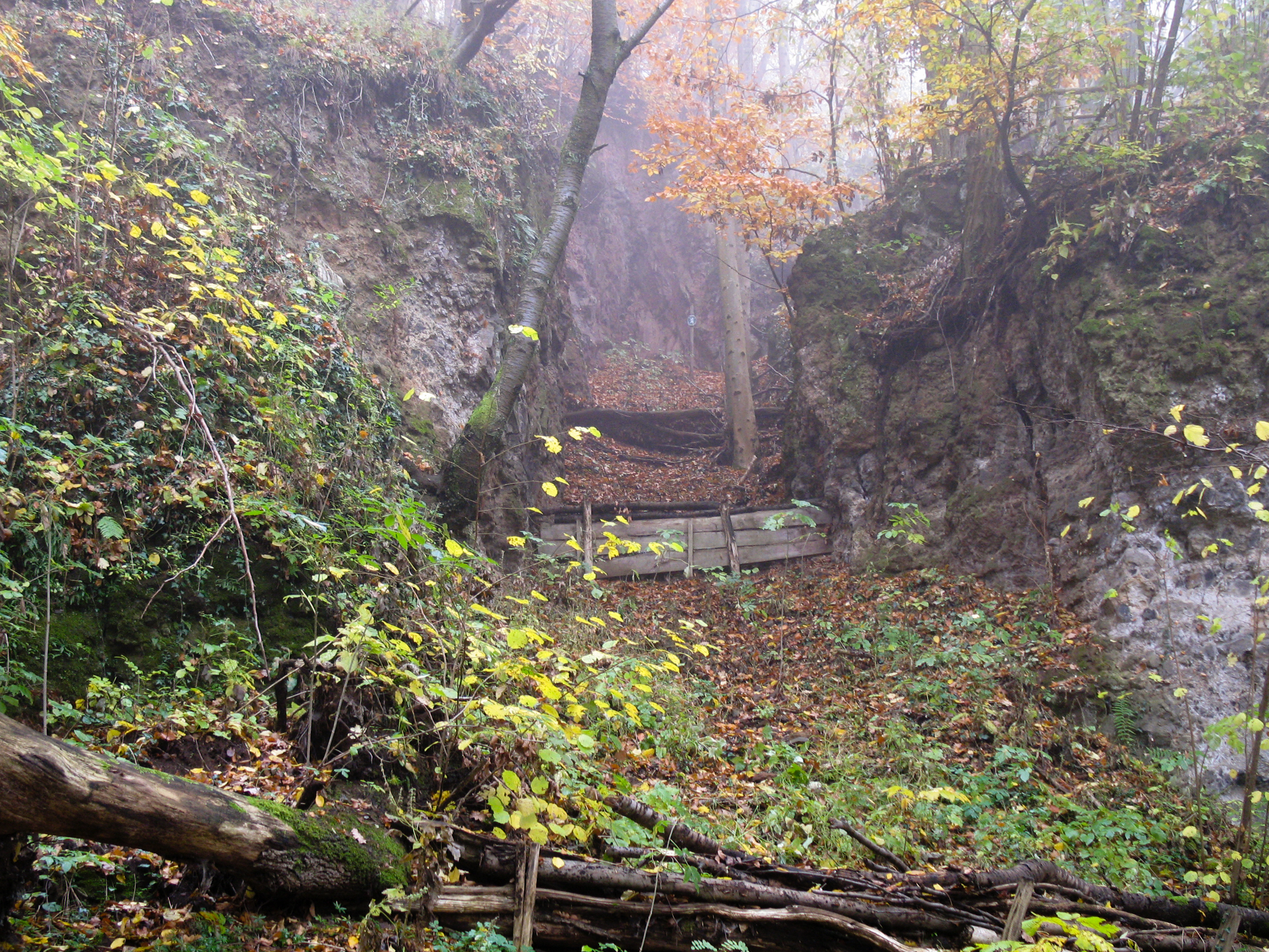 Die Basaltspalte von Tieschen ist ein Hinweis auf die vulkanischen Aktivitäten in dieser Gegend. This media shows the natural monument in Styria with the ID 1109 (Basaltspalte).